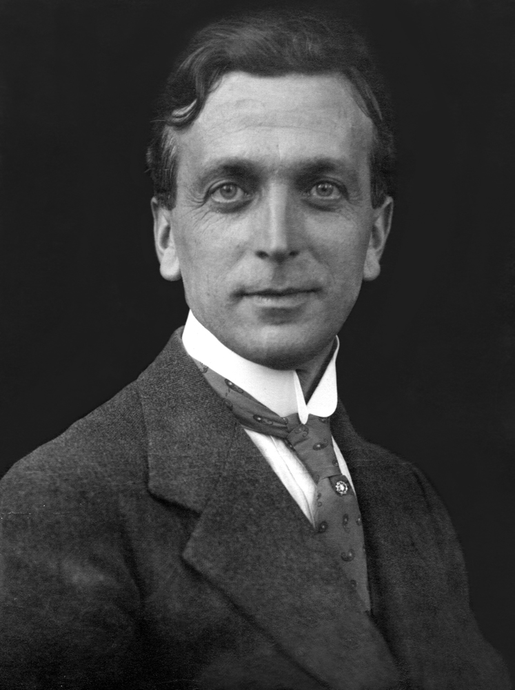 Romolo Bacchini negli anni '20